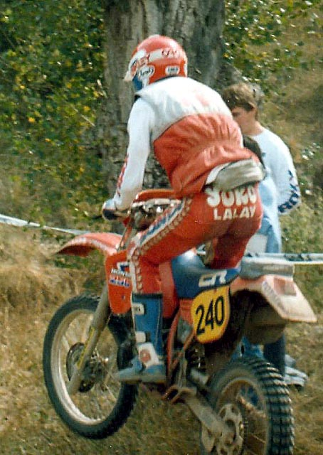 Gilles Lalay aux ISDE de Alp (Espagne).